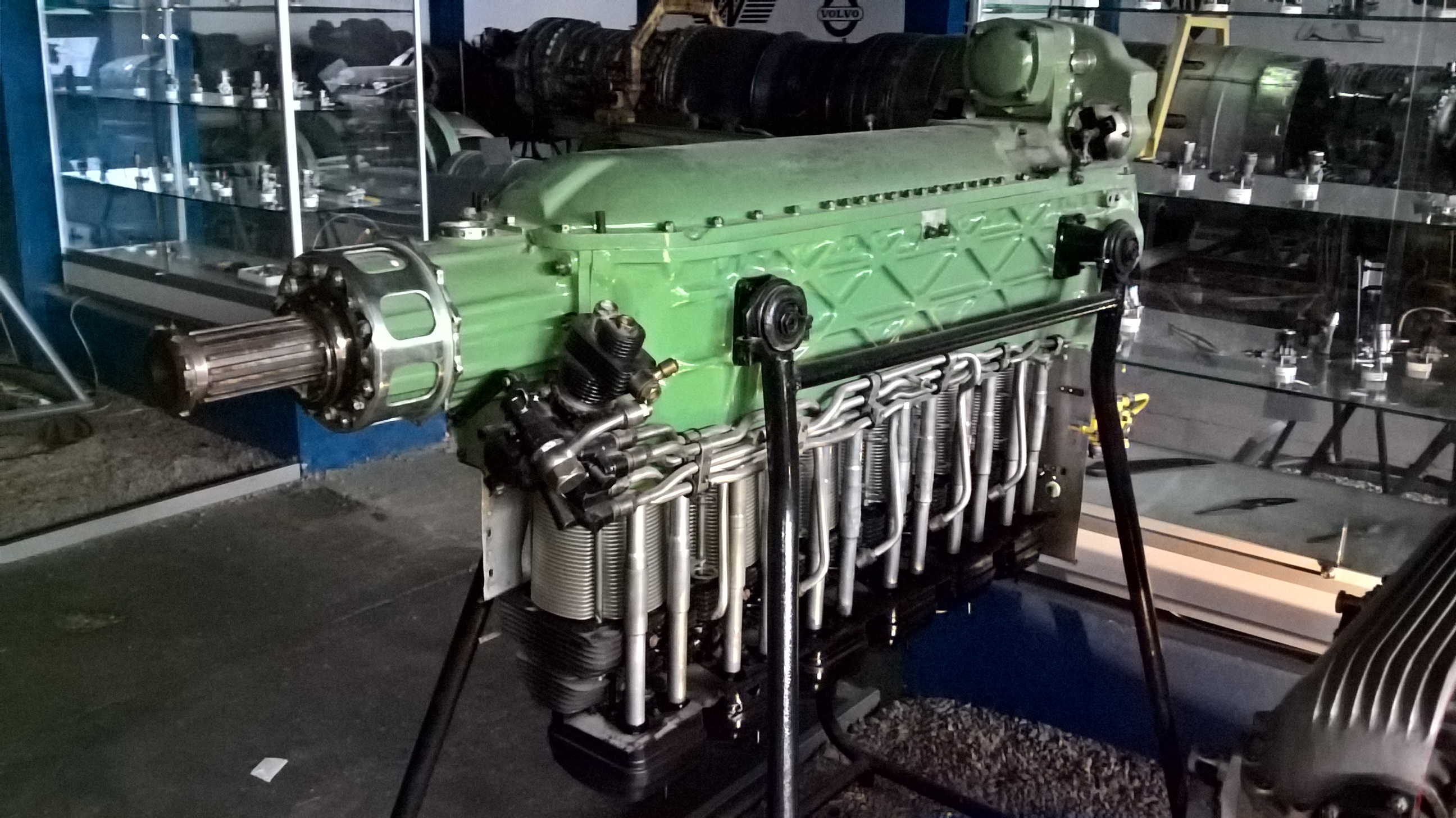 Francuski 6-cylindrowy silnik rzędowy Renault 6Q-11 z 1932 r. ze zbiorów Muzeum Lotnictwa Polskiego w Krakowie.